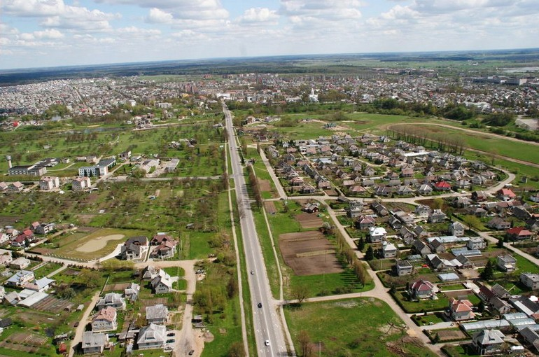 Butkeliai, Tauragės raj.